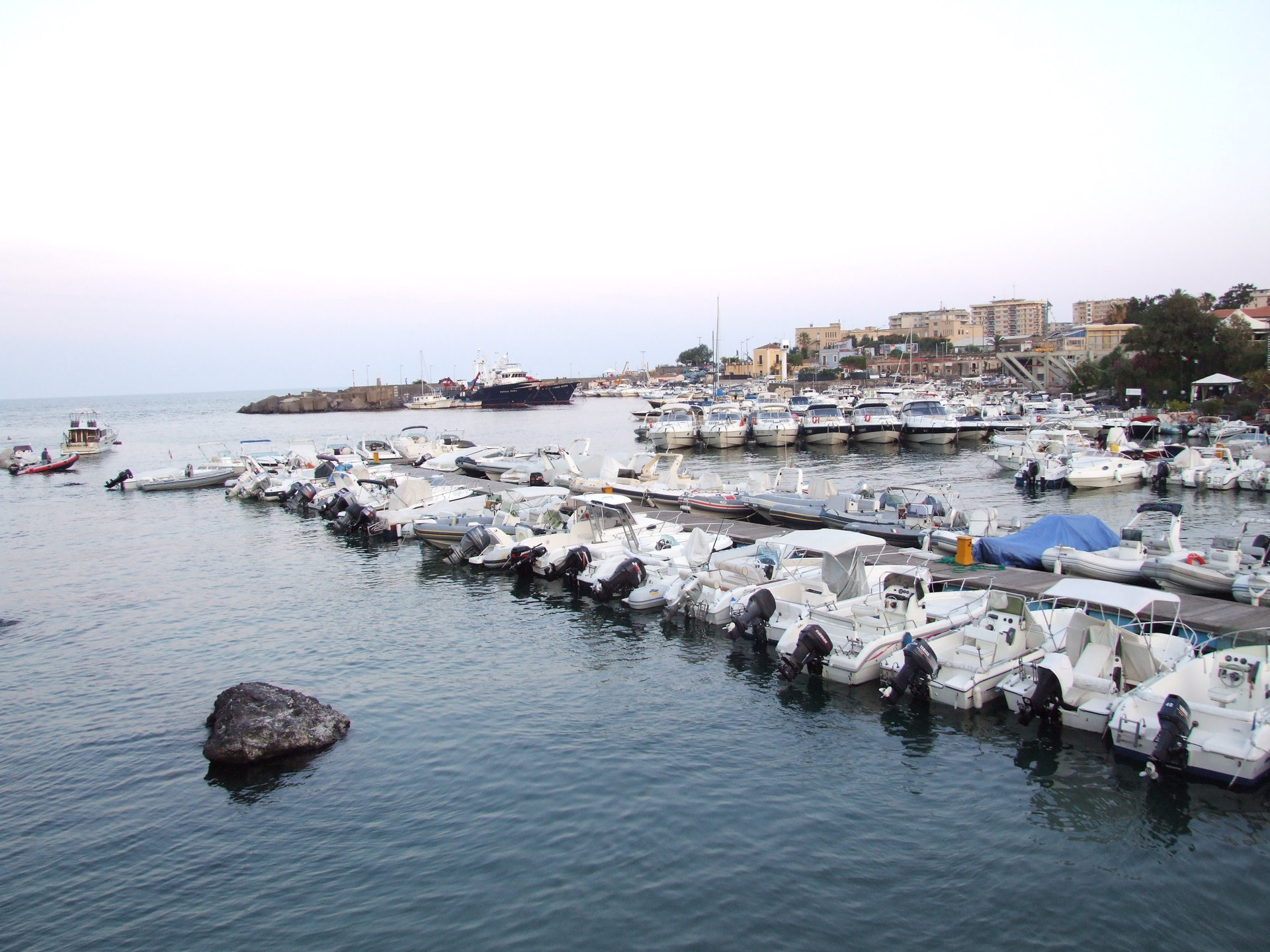 Porto Ulisse di Ognina Il porto Ulisse è il porticciolo di Ognina, borgata periferica della città di Catania, posto alle coordinate 37° 31',53 Nord e 15° 07',27 Est. Il porto Ulisse si trova sulla costa nord della città di Catania ricavato da un'insenatura nella scogliera rocciosa; era un approdo portuale di Catania sin dall'antichità. Nell'area ove sorge il porto attuale sfociava un fiume il Lognina od Ognina che venne seppellito da una colata lavica dell'Etna in epoca medioevale. Nel 1381 il borgo di Ognina venne interamente sepolto da una colata di lava e dell'approdo rimase solo una piccola insenatura, quella attuale. Nel porto era presente anche una fiorente attività cantieristica i cui mastri d'ascia erano conosciuti ed apprezzati. Da porto da pesca nel dopoguerra si è lentamente attrezzato come porto turistico ed oggi offre servizi ed assistenza specializzati. Il porto si trova circa 3 miglia a nord-est del Porto di Catania ed è protetto da un molo foraneo di oltre 150 m con faro rosso di segnalazione sulla testata, un molo interno più piccolo e vari pontili galleggianti. I fondali vanno da 1,5 a 12 metri di profondità e sono fangosi nella parte più interna e rocciosi verso l'esterno. Il porto è attrezzato con rifornimento di carburante ed acqua, cantieri navali e quattro gru di alaggio. Vi hanno sede diversi Club nautici.